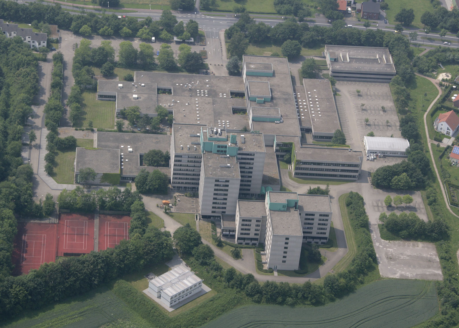 Luftbildaufnahme Hamm